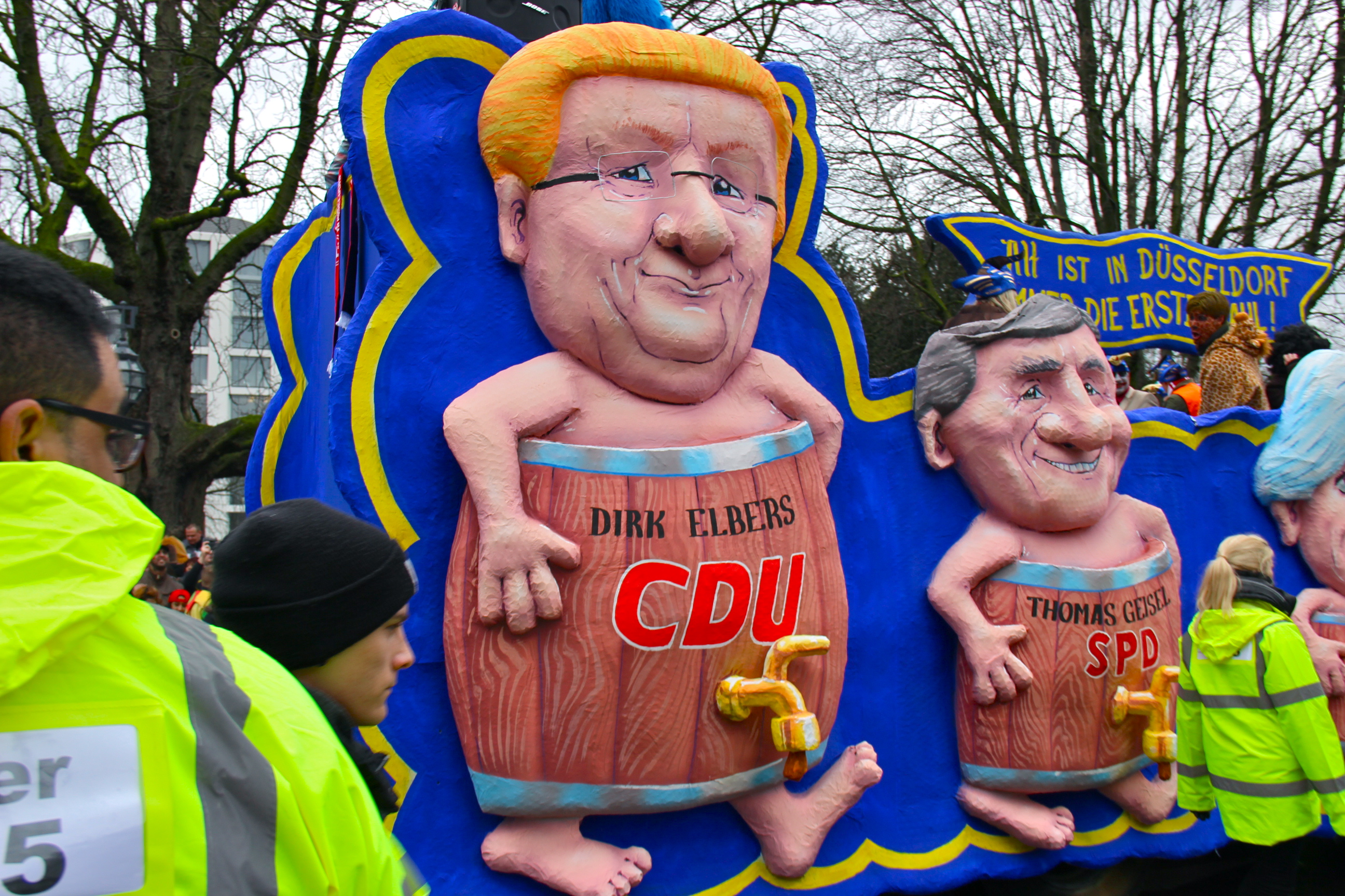 Düsseldorf Karneval 2014